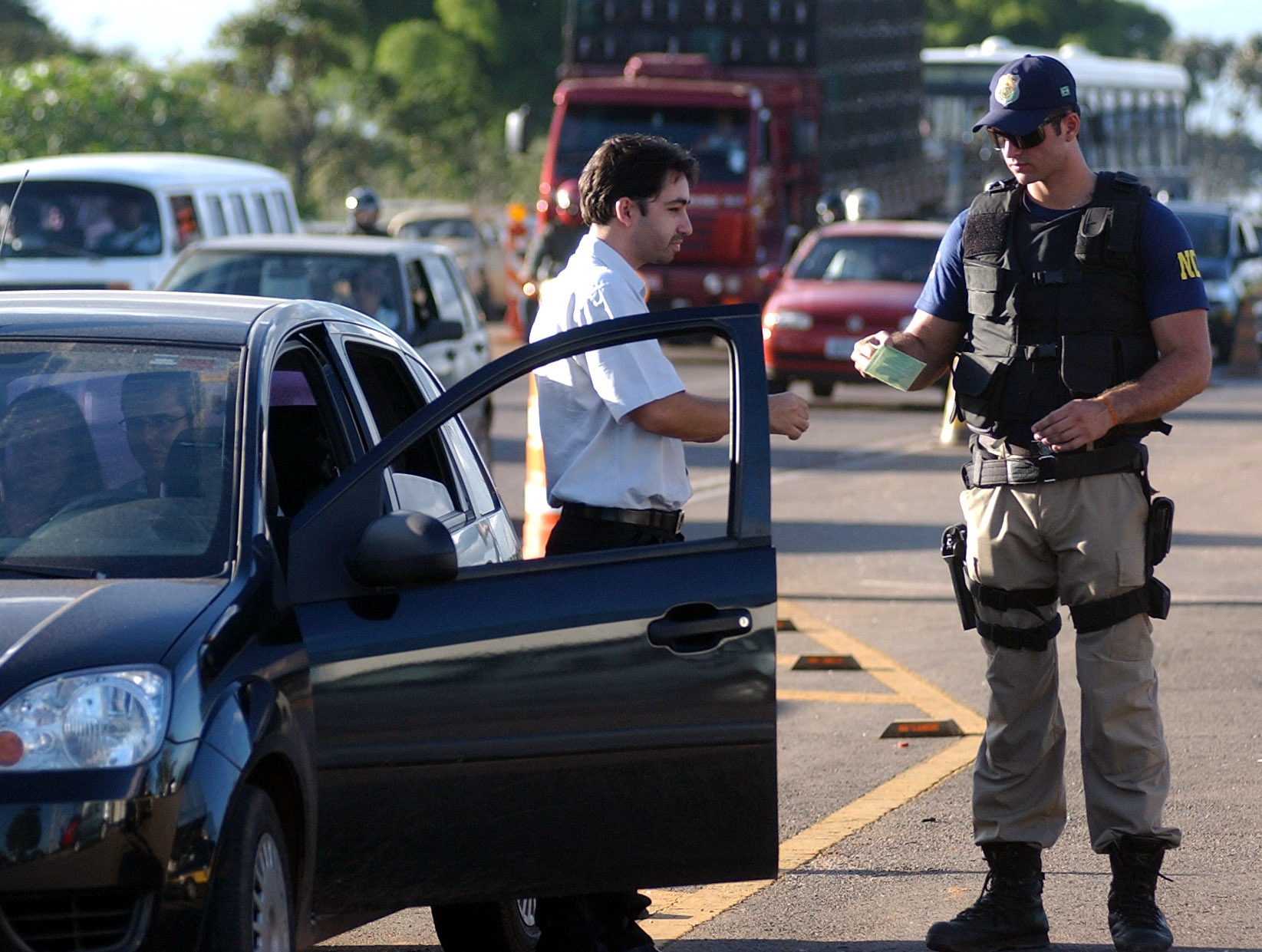 Brasília - Polícia Rodoviária Federal realiza operação para o carnaval. Serão utilizados 10 mil policiais, 2 mil viaturas, helicópteros e motocicletas nos 60 mil quilômetros de rodovias federais do país, durante os cinco dias de feriado.